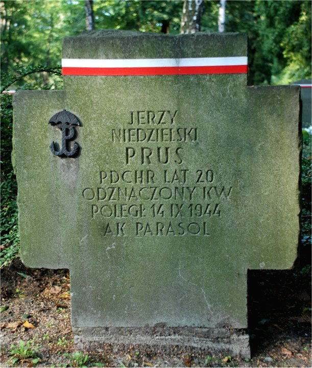 Grób Jerzego Niedzielskiego na Powązkach wojskowych w Warszawie